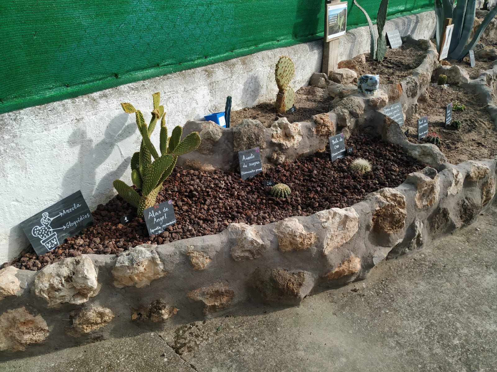 Vista lateral de "El Cactarium" de ZOO KOKI, donde se pueden ver algunas de las especies.